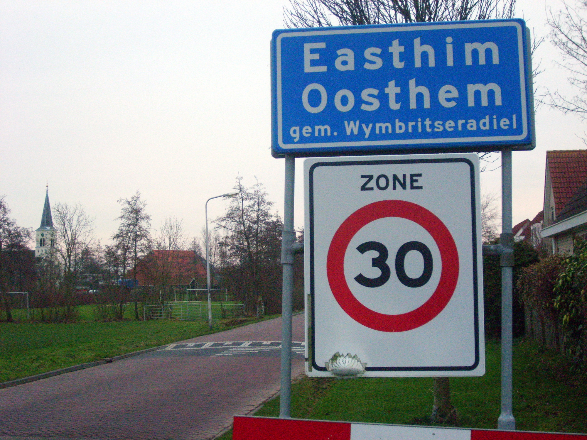 Plaatsnaambord van Oosthem(fr.: Easthim) met links op de achtergrond de kerk van het dorp en iets meer in de voorgrond een trapveldje.